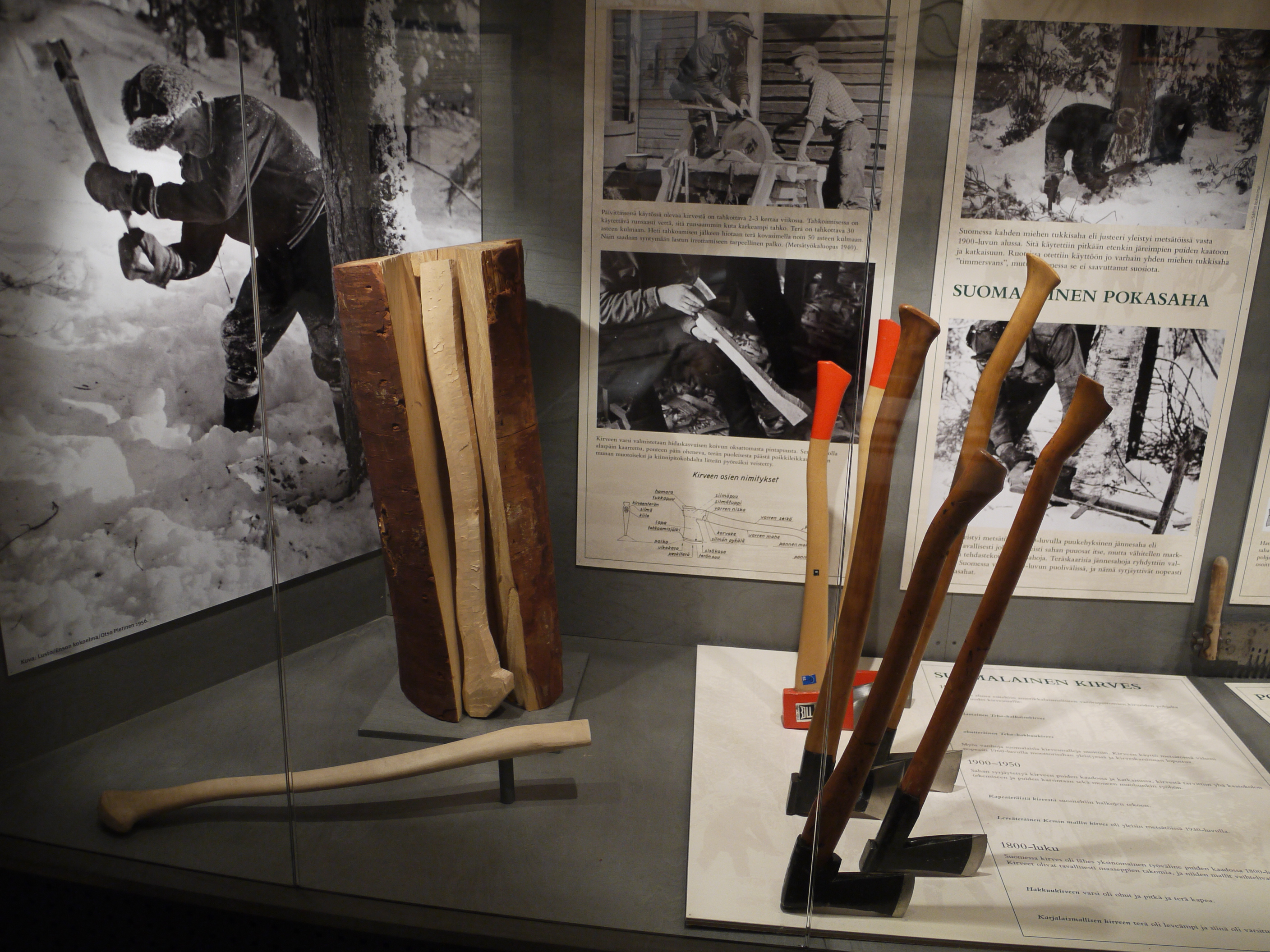 finnische Museum und Wissenschaftszentrum für Waldkultur LUSTO, Holzfälleraxt, mehrere Formen, wie entsteht ihr Stiel, Fotos vom Einsatz